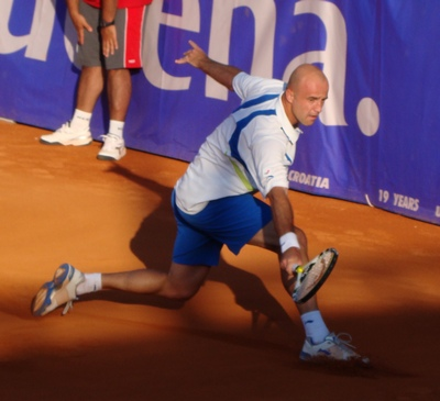 Ivan Ljubičić in Umag, Croatia